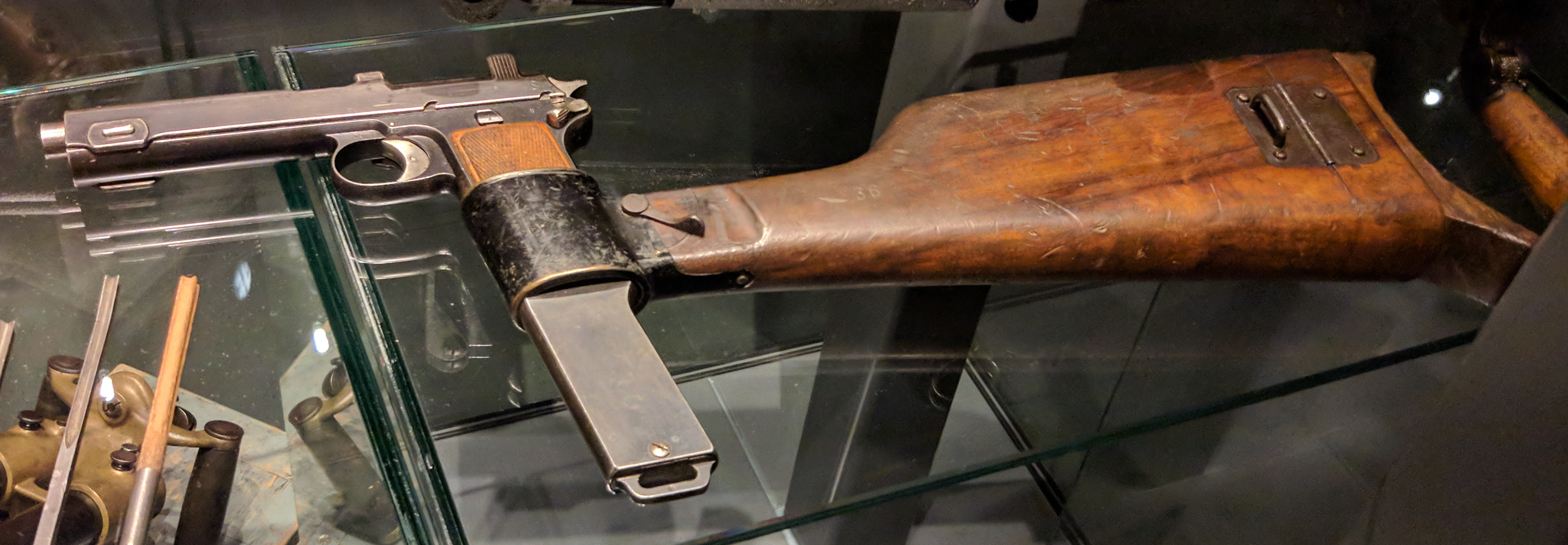 Avstroogrska karabinka Repetierpistole M1912/P16